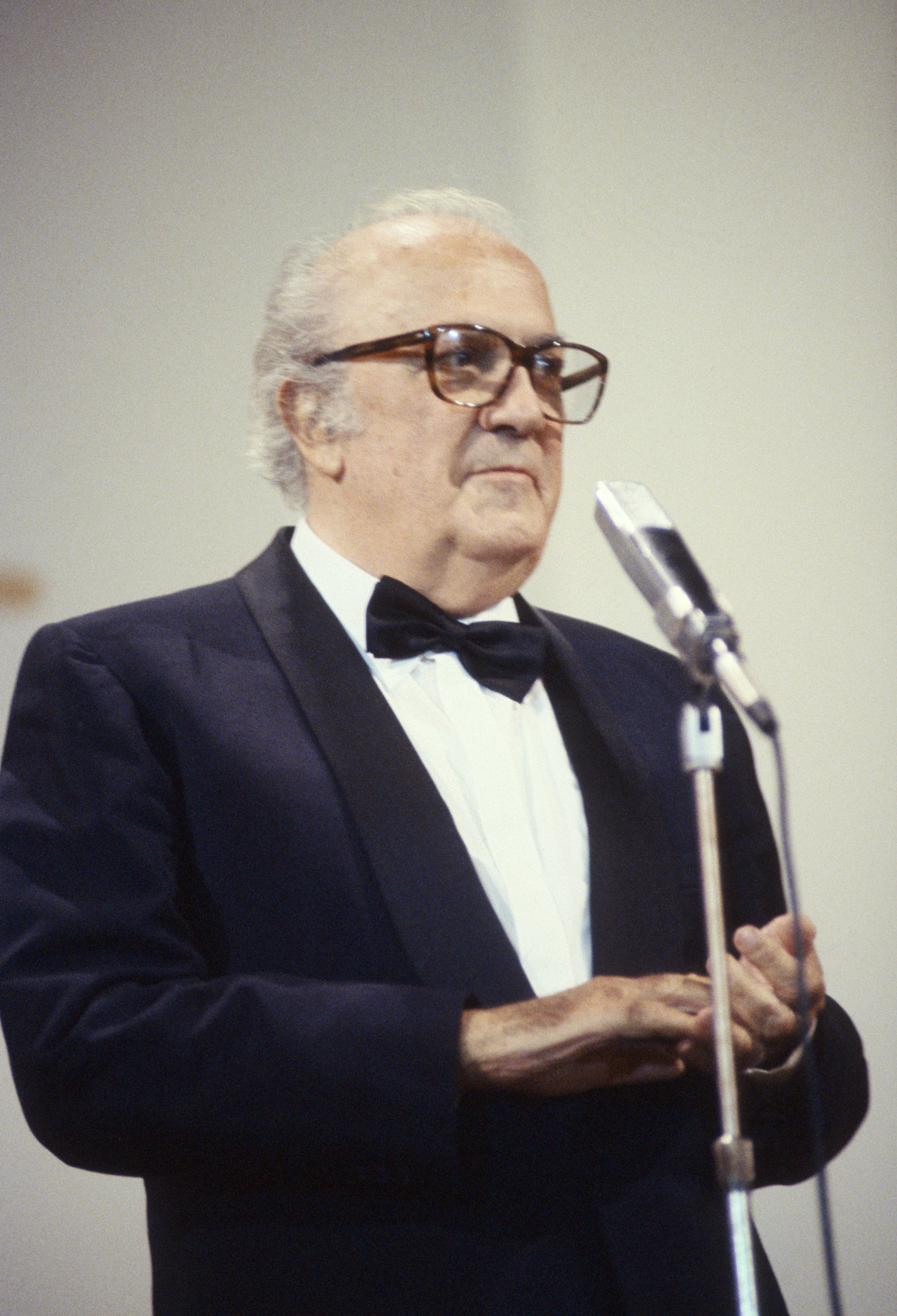 federico fellini alla Mostra del cinema di Venezia del 1990